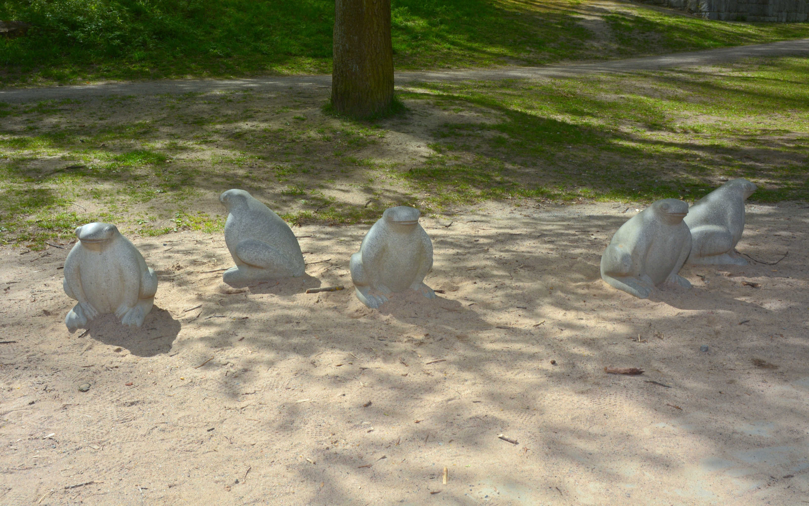 Grodskulpturer i Sannadalsparken, Gröndal, södra Stockholm.